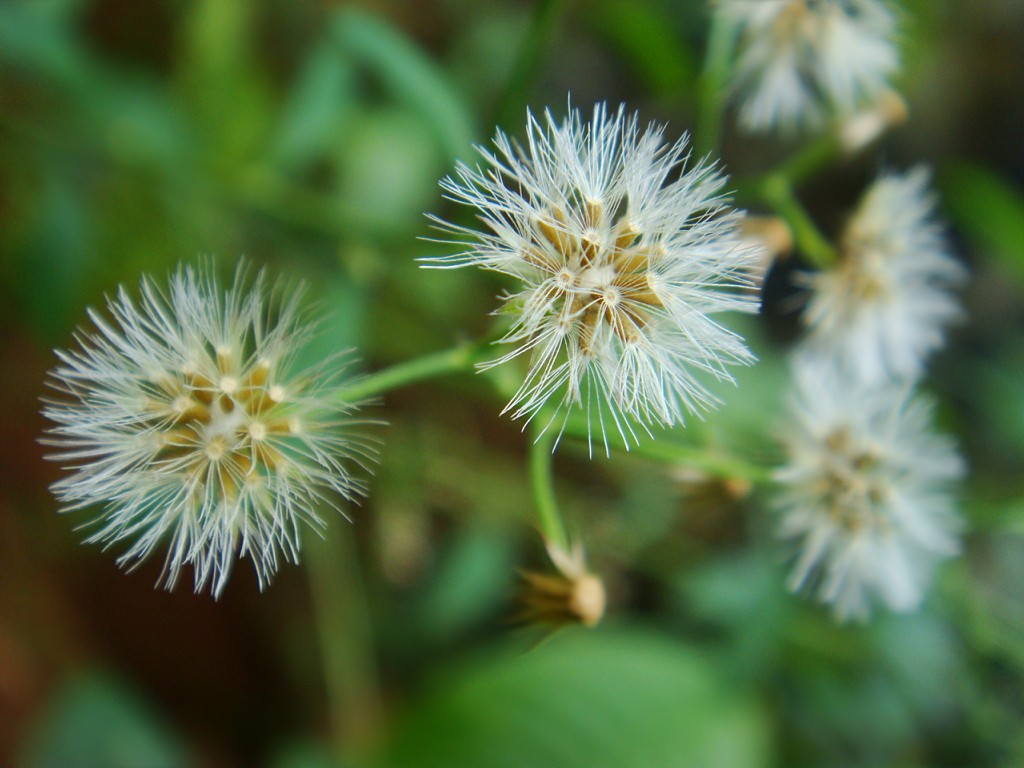 പുവാം കുരുന്നൽ പൂവ് വിടർന്നത്